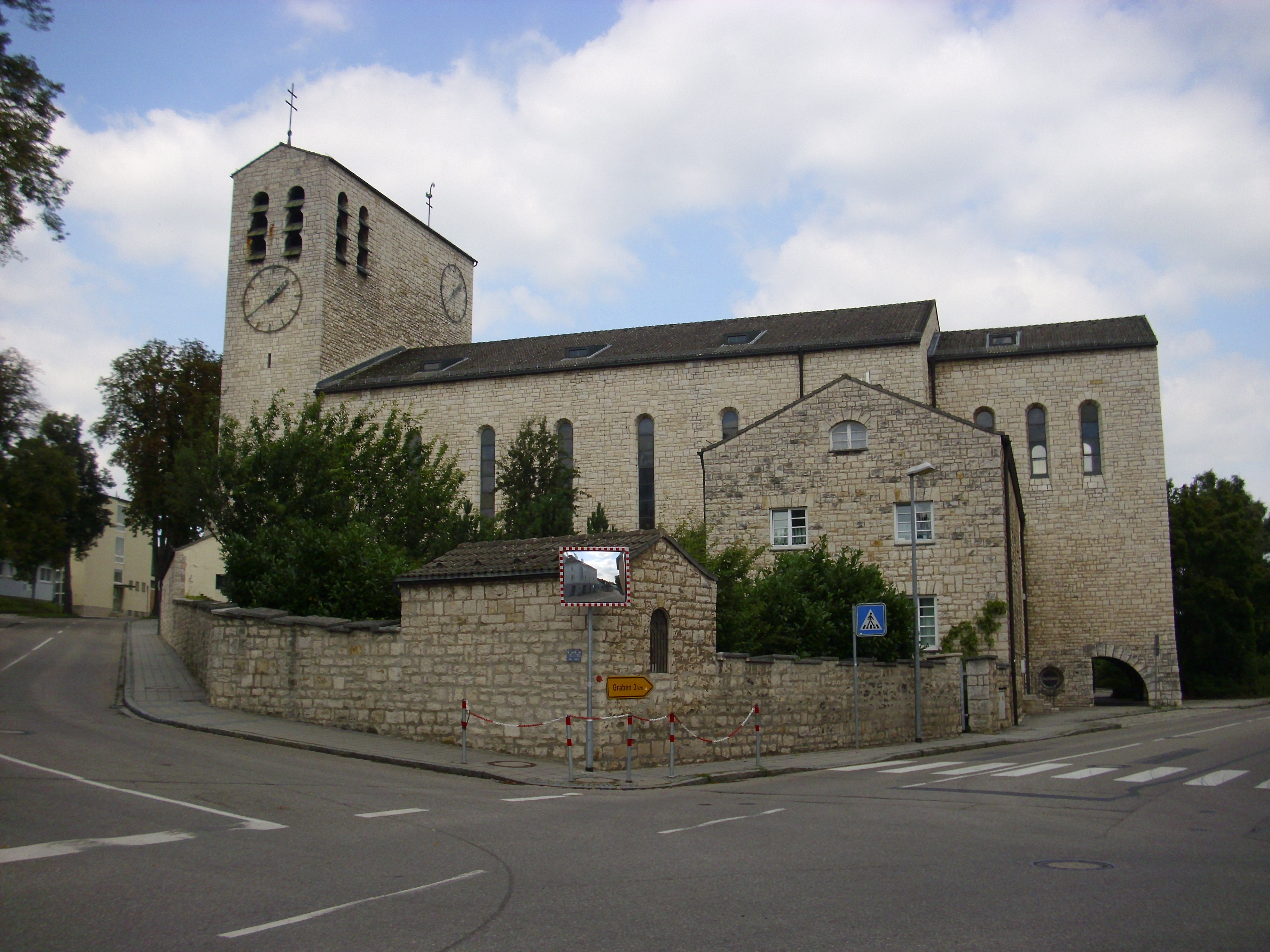 Marienkirche in Treuchtlingen an der Einmündung der Elkan-Naumburg-Straße in die Bahnhofstraße